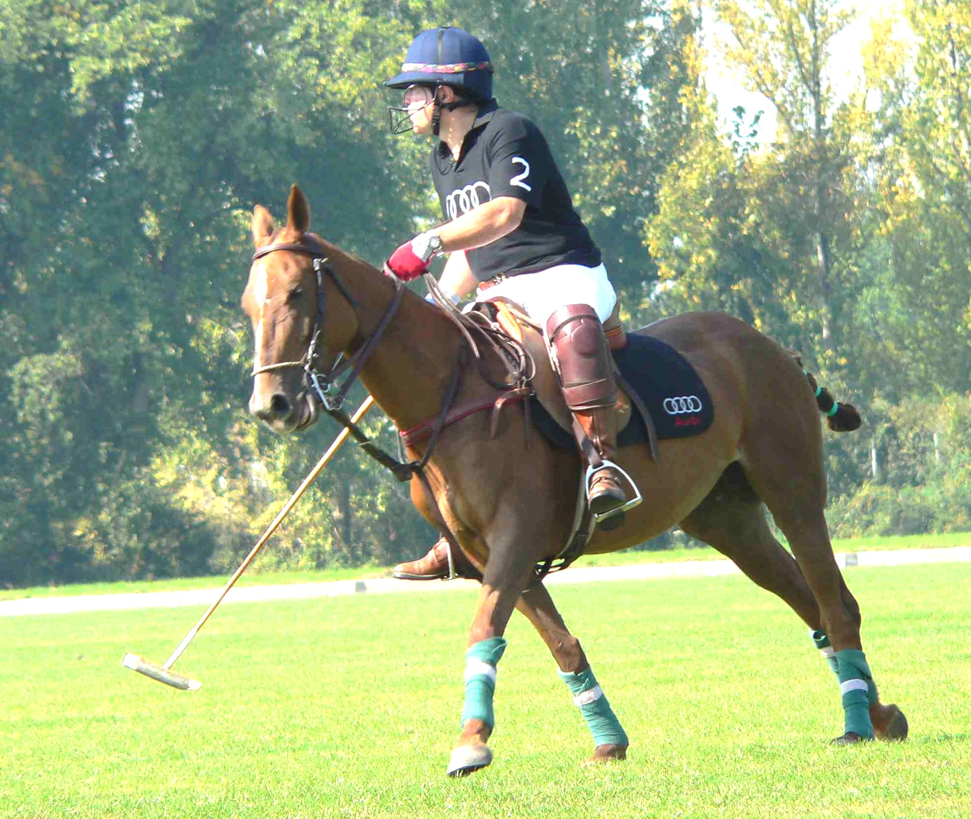 Polo